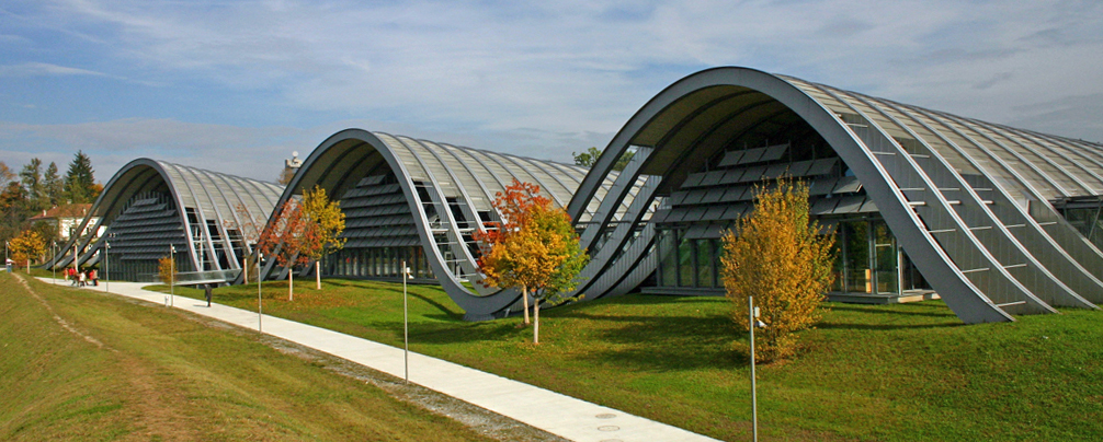 Frontansicht des Paul Klee Zentrums, Bern, Schweiz